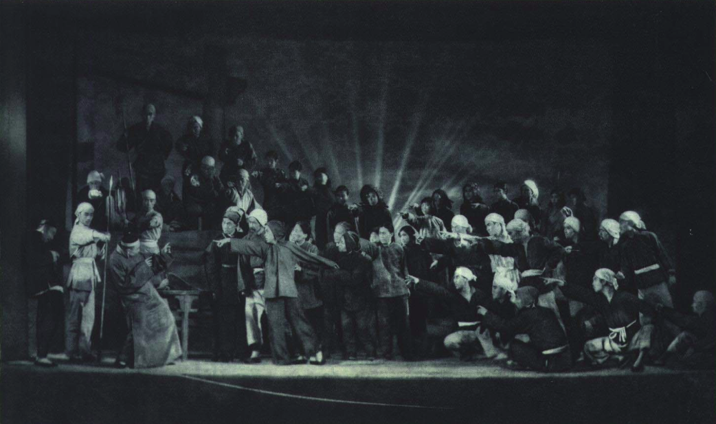 戏剧《白毛女》中黄世仁被批斗，1950年8月的《人民画报》。